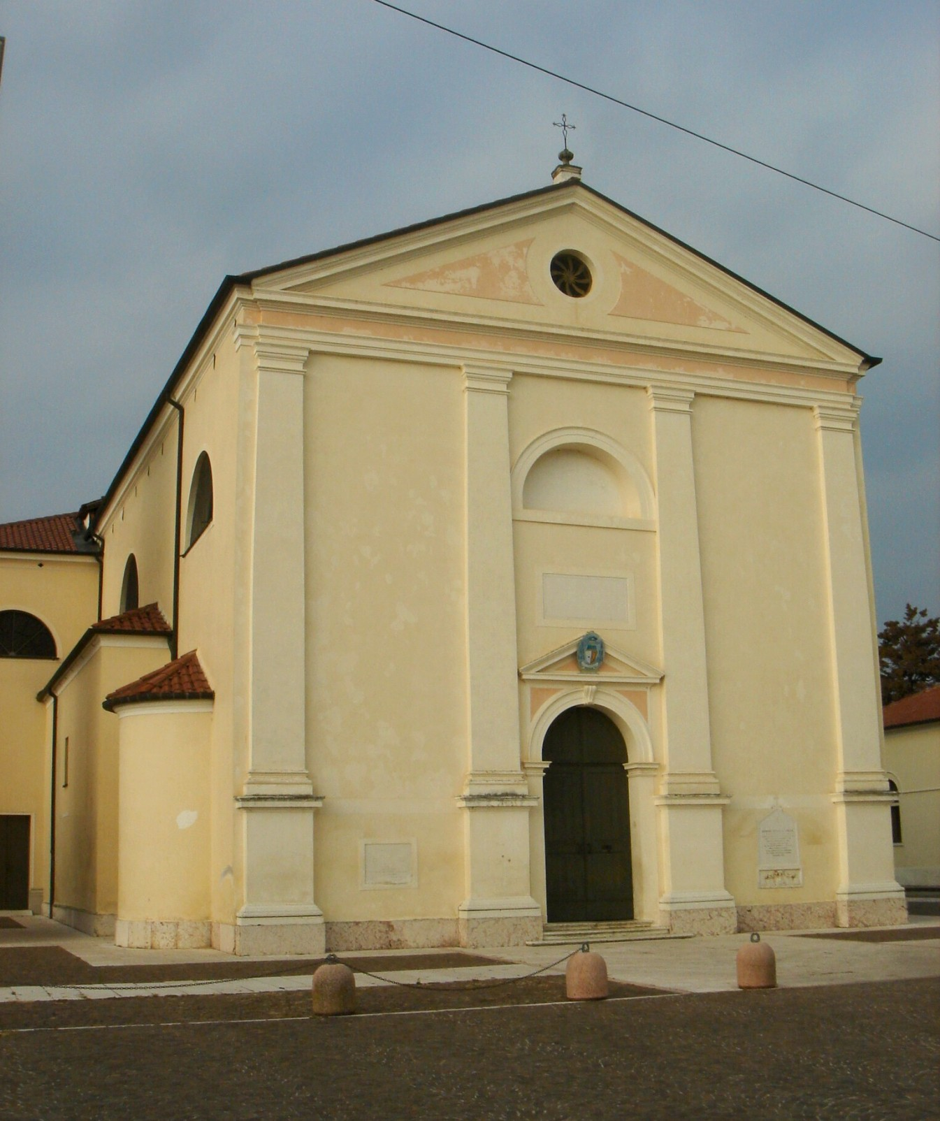 Altivole (Treviso): facciata della chiesa parrocchiale.